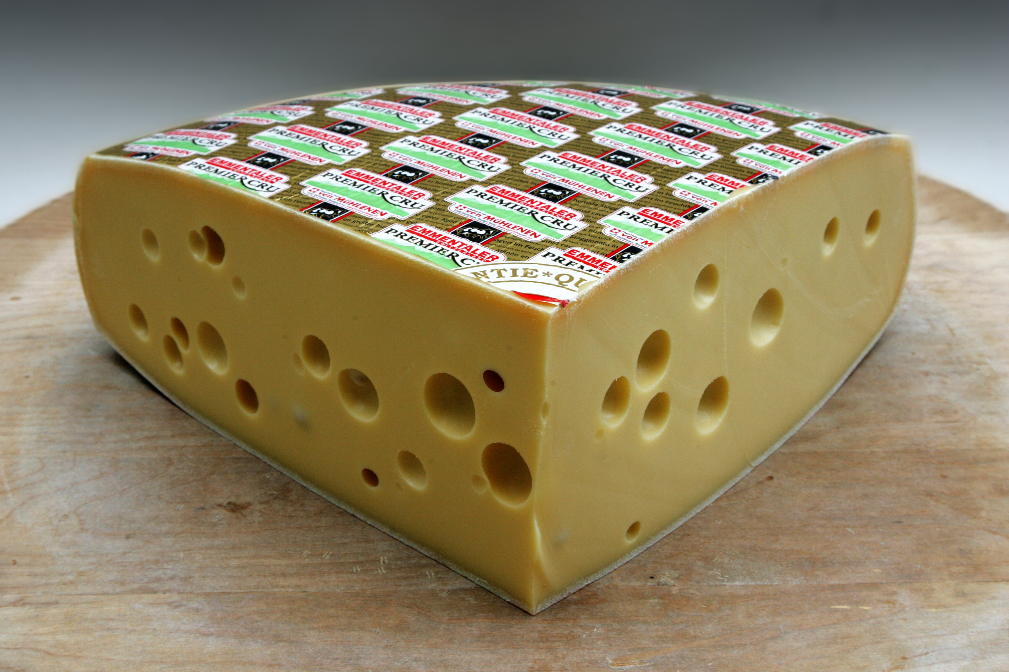 Emmentaler Premier Cru: Keil-Stück